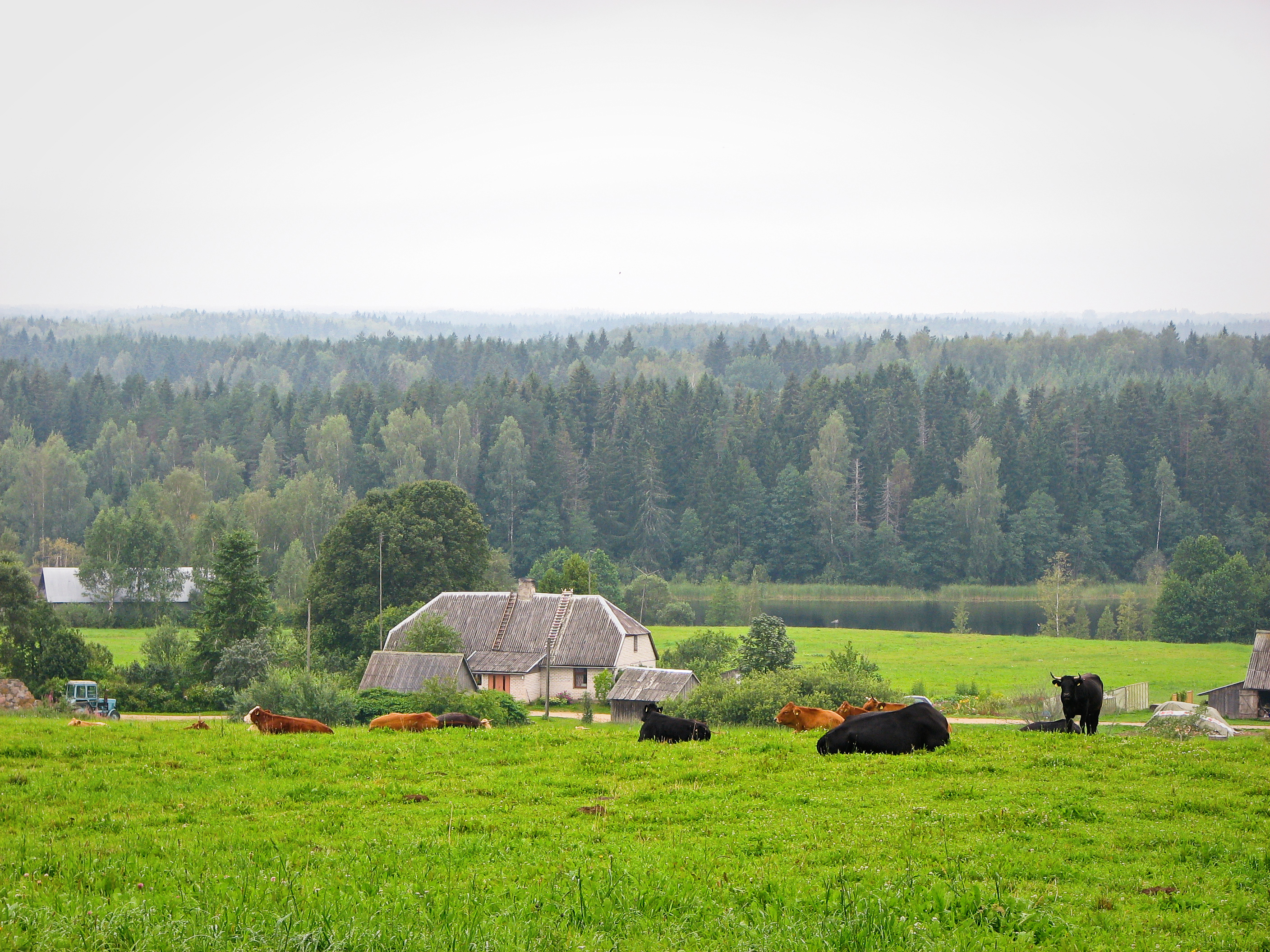 хутор у озера